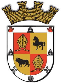 Escudo de Coamo